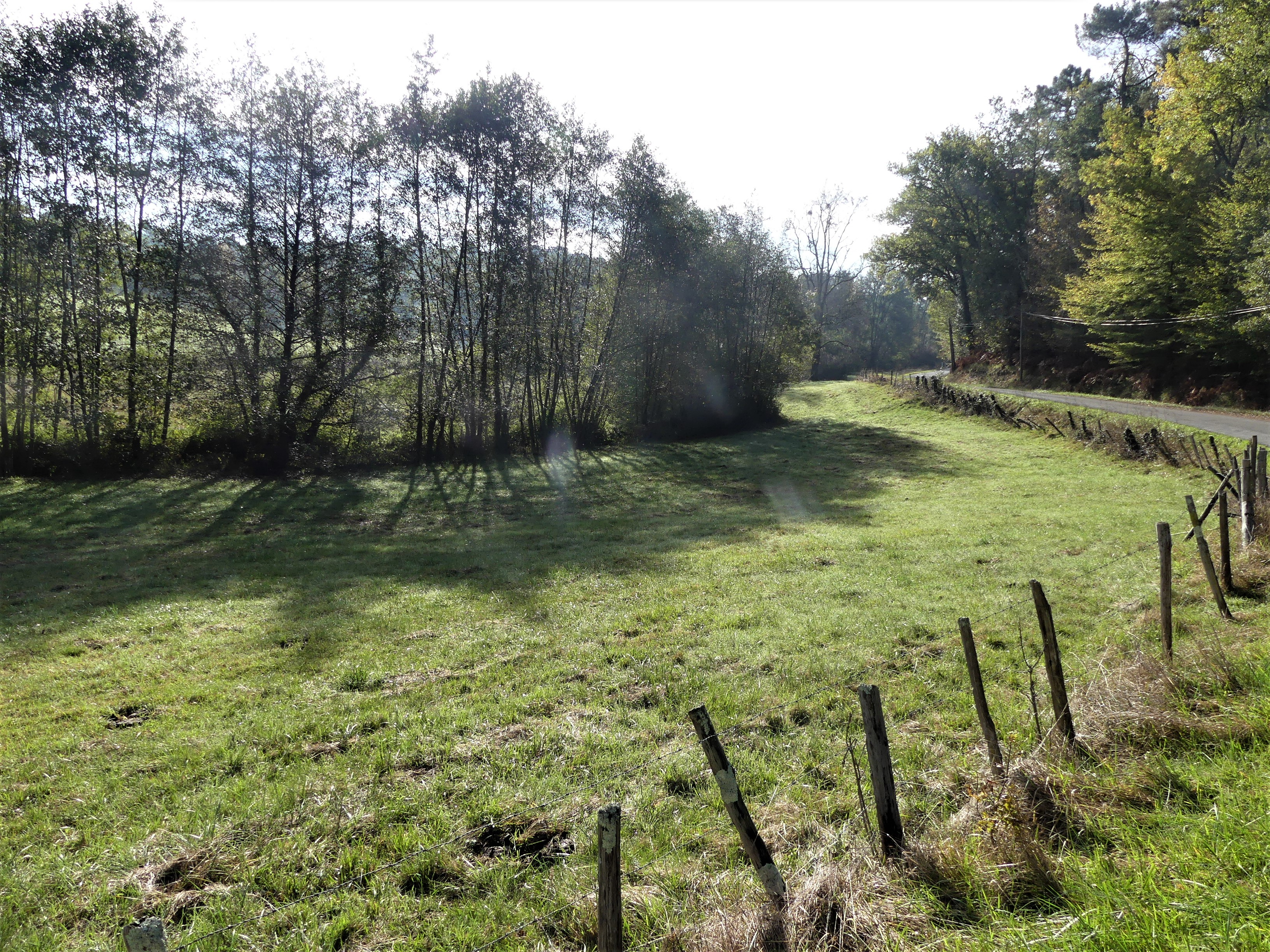 La vallée de l'Eyraud au sud-ouest du bourg de Laveyssière, Dordogne, France.